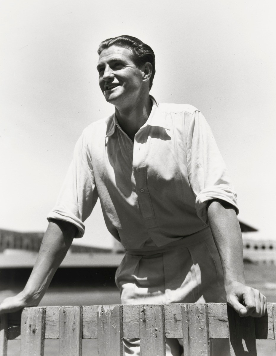 Keith Miller